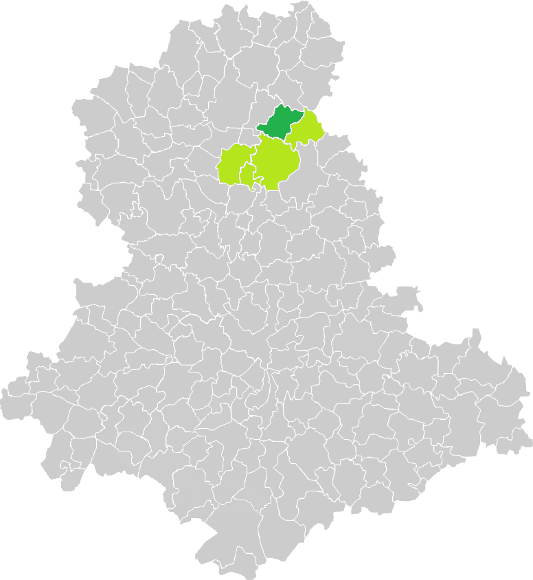 Carte de situation de la commune de Saint-Sornin-Leulac (en vert foncé) dans le votre Canton (en vert clair) sur une carte des communes de la Haute-Vienne